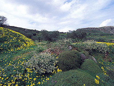 Blühende Phrygana - Ostkreta